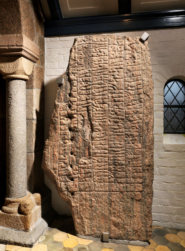 Foto af Roberto Fortuna